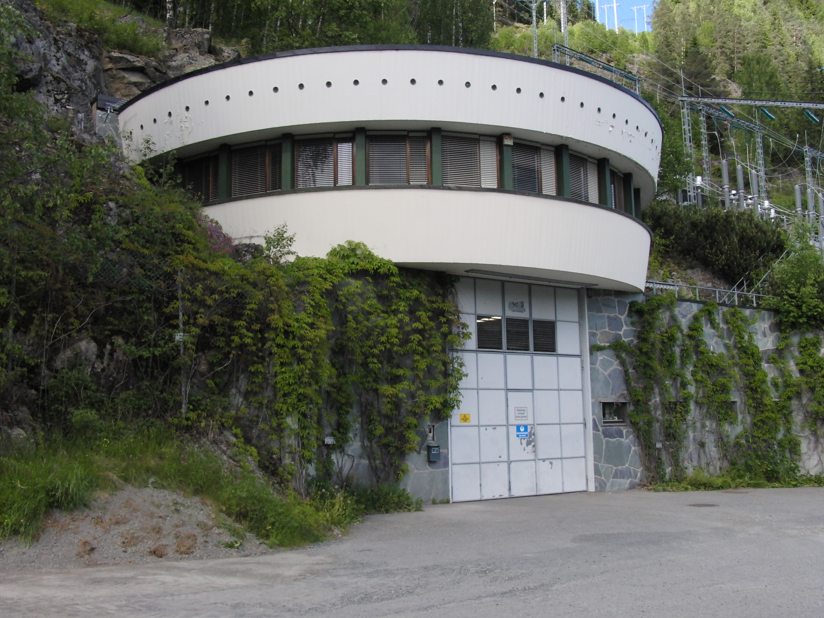 Bagn kraftstasjon